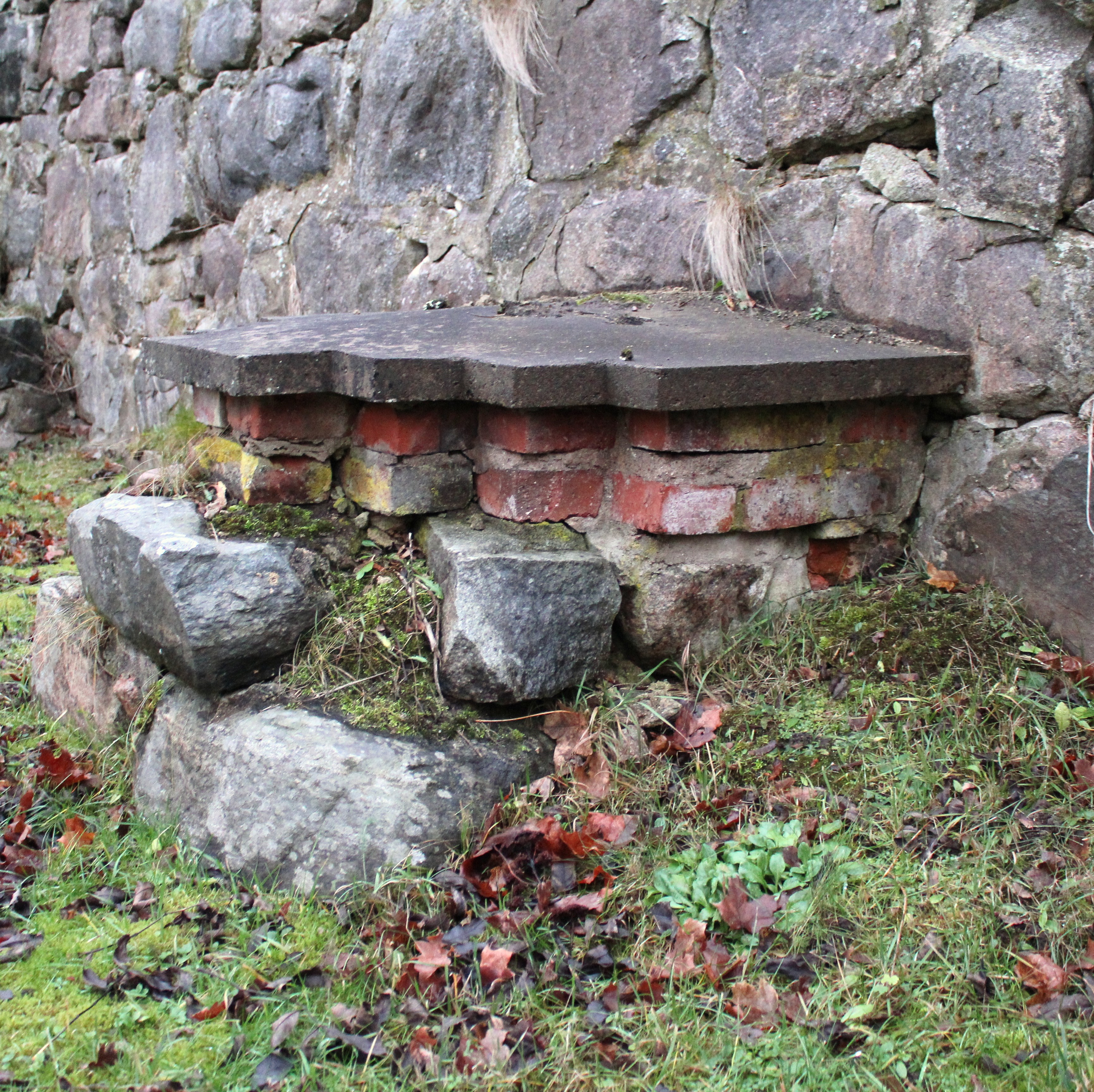 Karls kyrkoruin i Söderby-Karls socken, Norrtälje kommun.